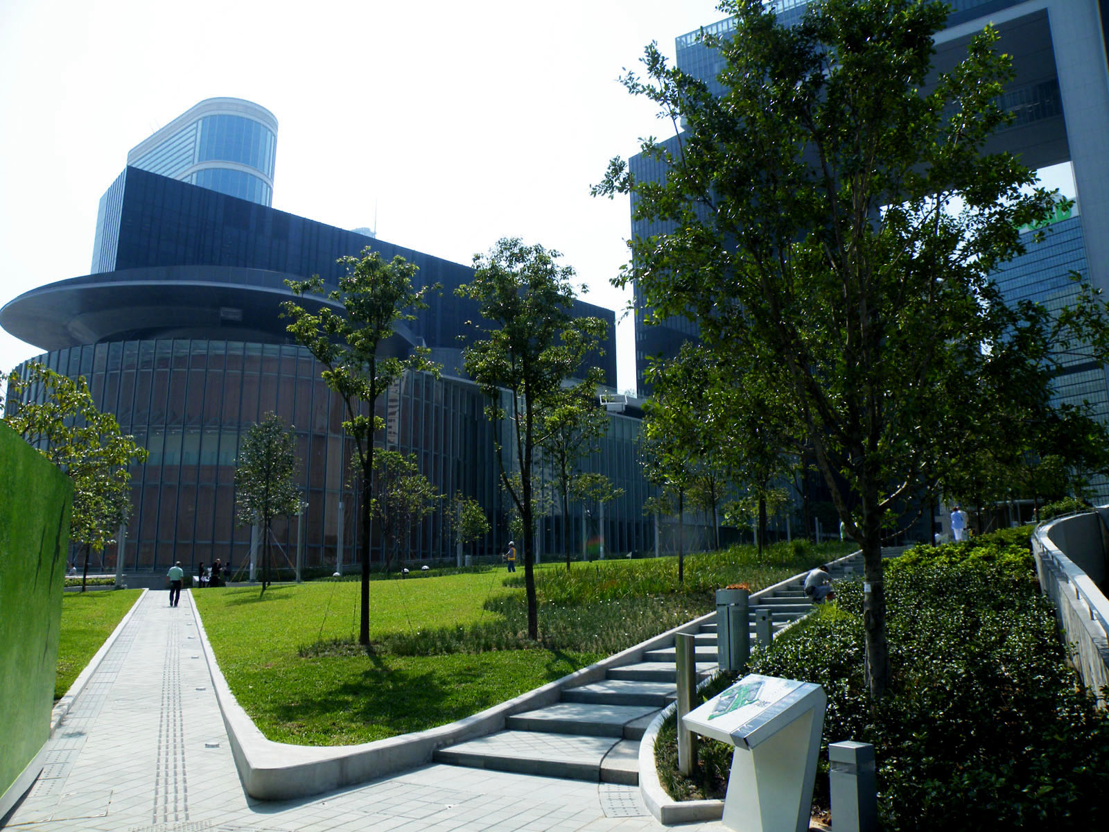 Tamar Park